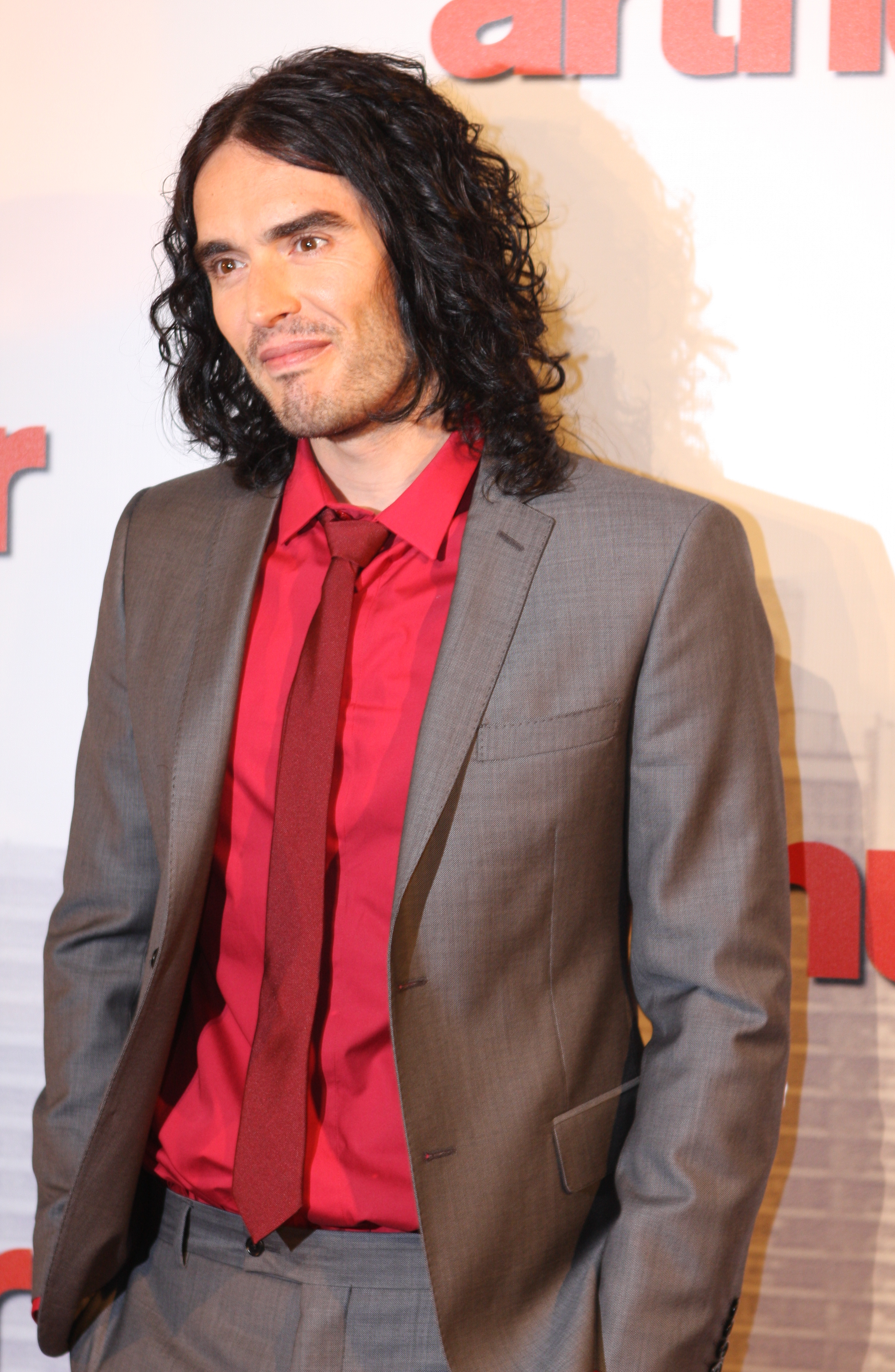 Russell Brand Arthur Premier